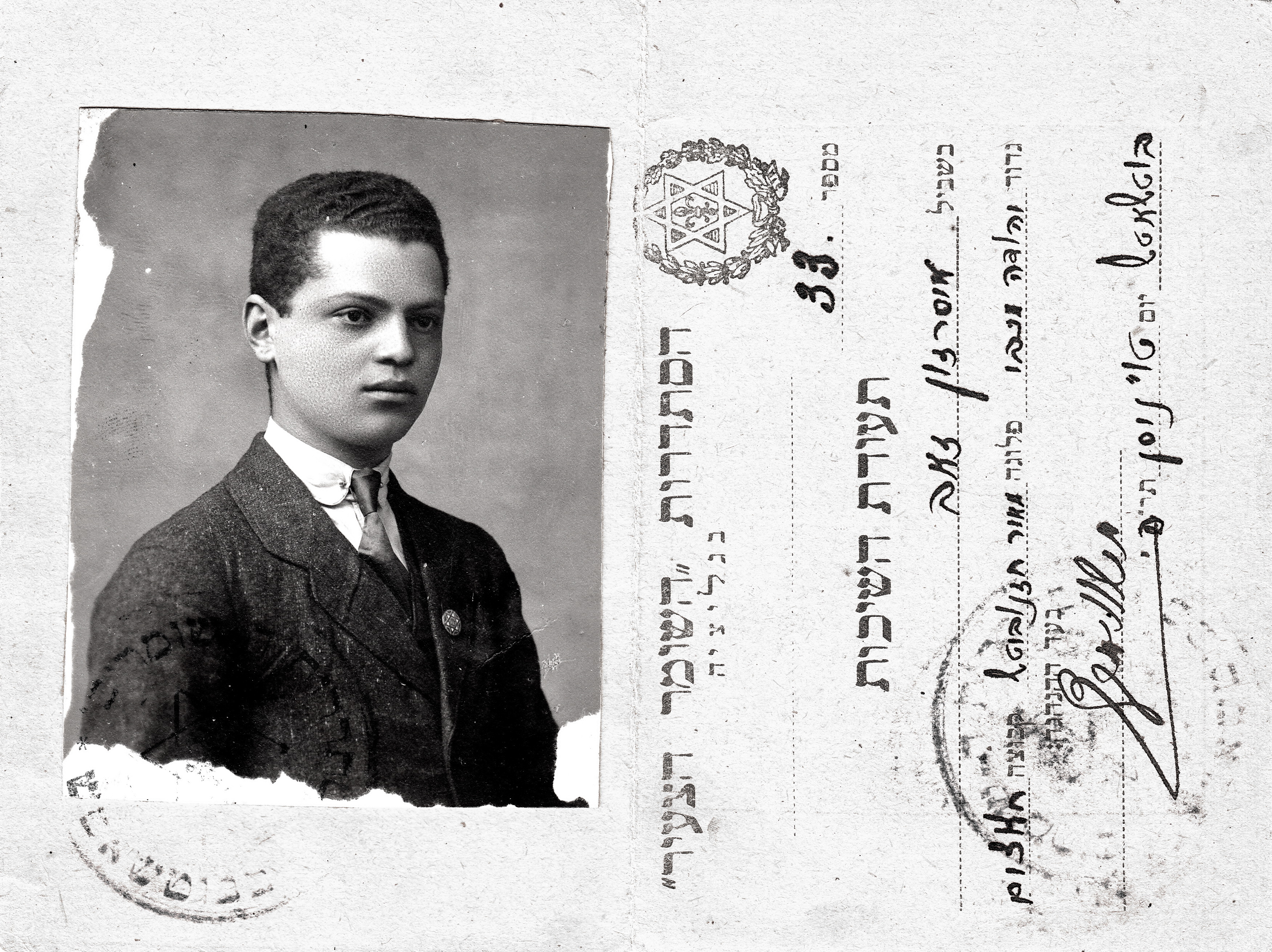 זאב איסרזון. תעודת חבר בתנועת השומר הצעיר. 1920 גליציה פולין